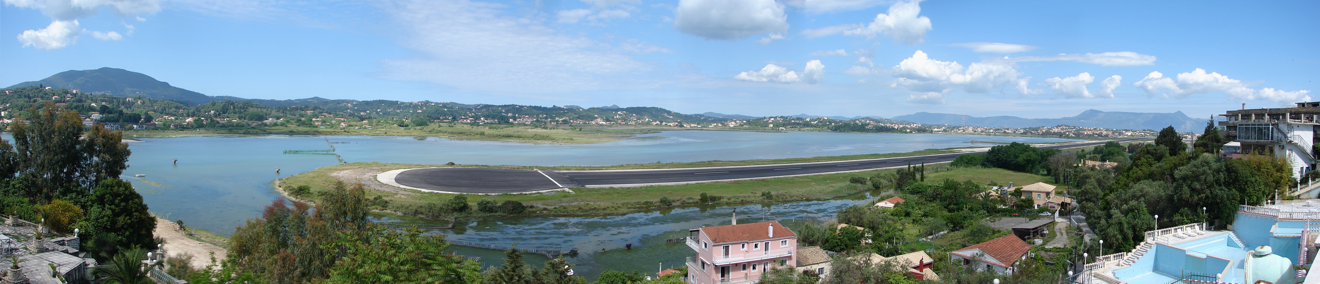 Start- und Landebahn des Flughafen Korfu